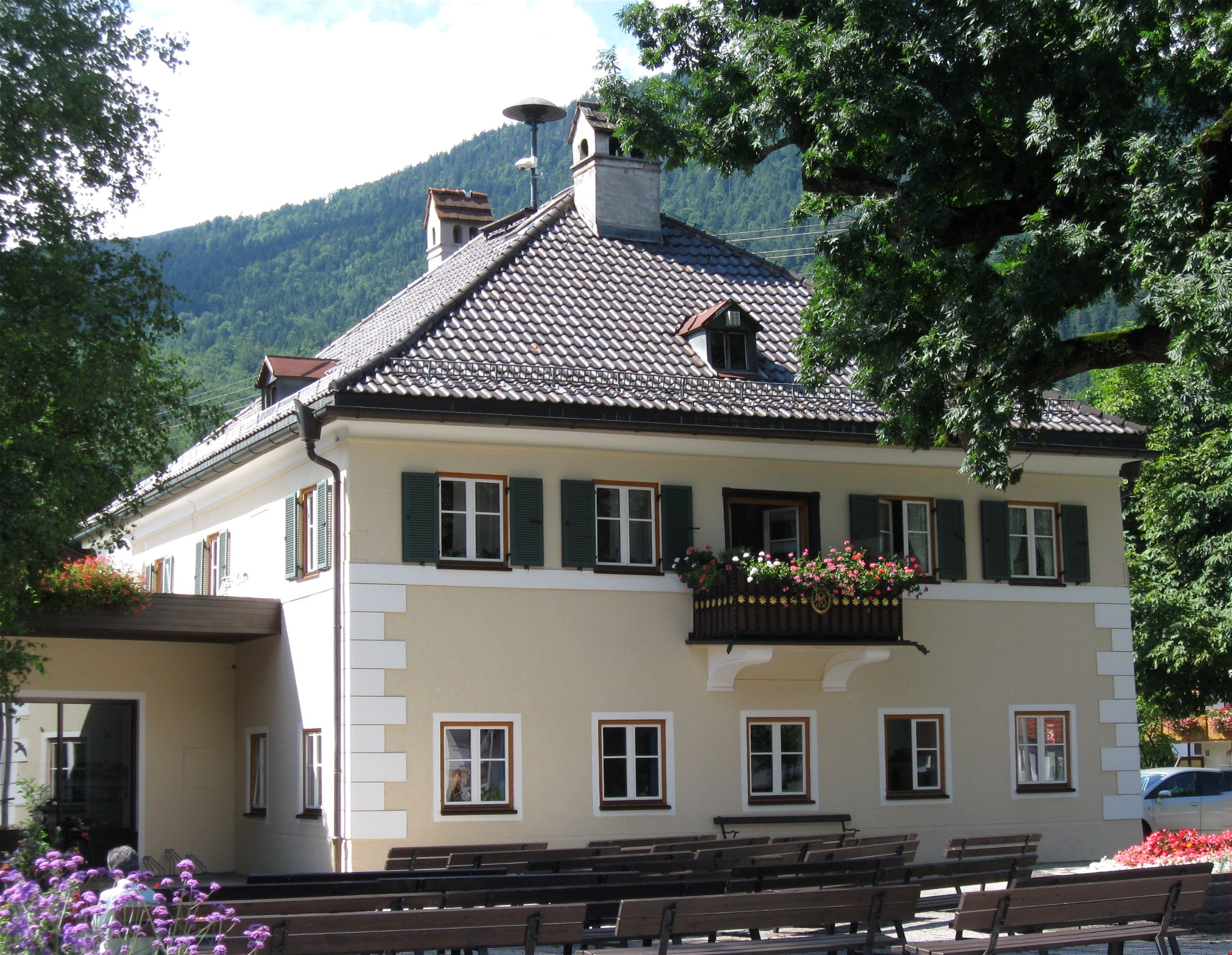 Am Gern 1; Ehem. Wohnhaus, jetzt Rathaus; Ehem. Wohnhaus des Großkaufmanns Martin Kirchmayr (1760-1841); zweigeschossiger biedermeierlicher Walmdachbau mit Eisenbalkon und Putzgliederung, bez. 1836; zweiflügelige, geschnitzte Haustür